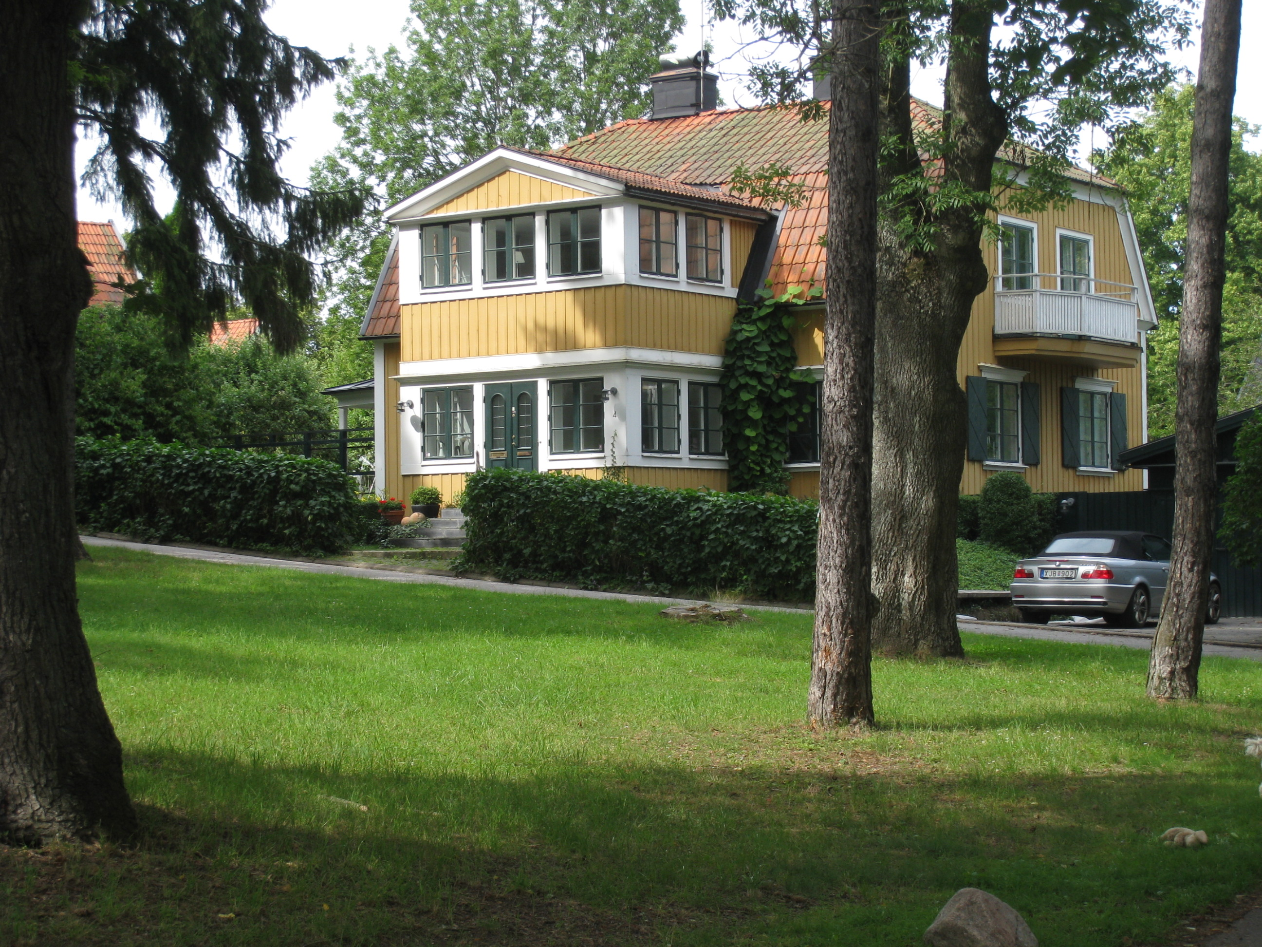 Villa vid Vallarestigen 4 i Ålsten, Bromma. Villan ligger i korsningen vid Per Albins Väg, som gränsar till Ålstensängen.